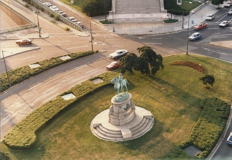 Statue équestre du général George Henry Thomas située au rond-point Thomas, à Washington, D.C.